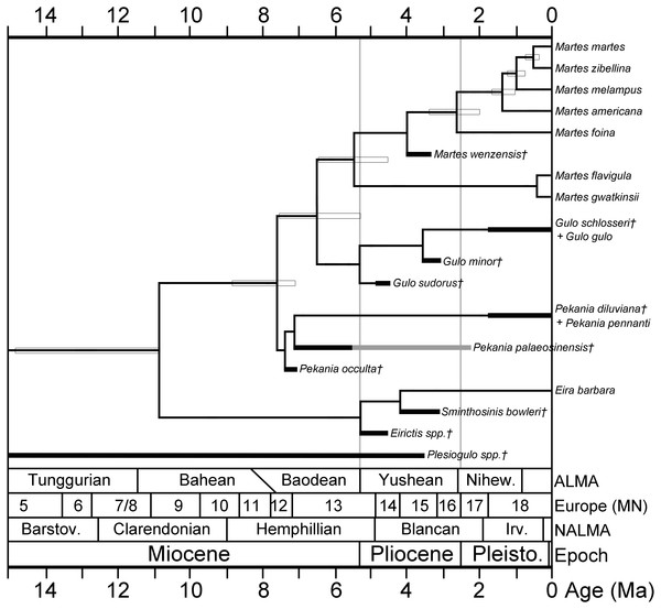 Filogènesi dels mustèlids gulonins amb les dates de divergència estimades i edats geològiques dels fòssils coneguts.